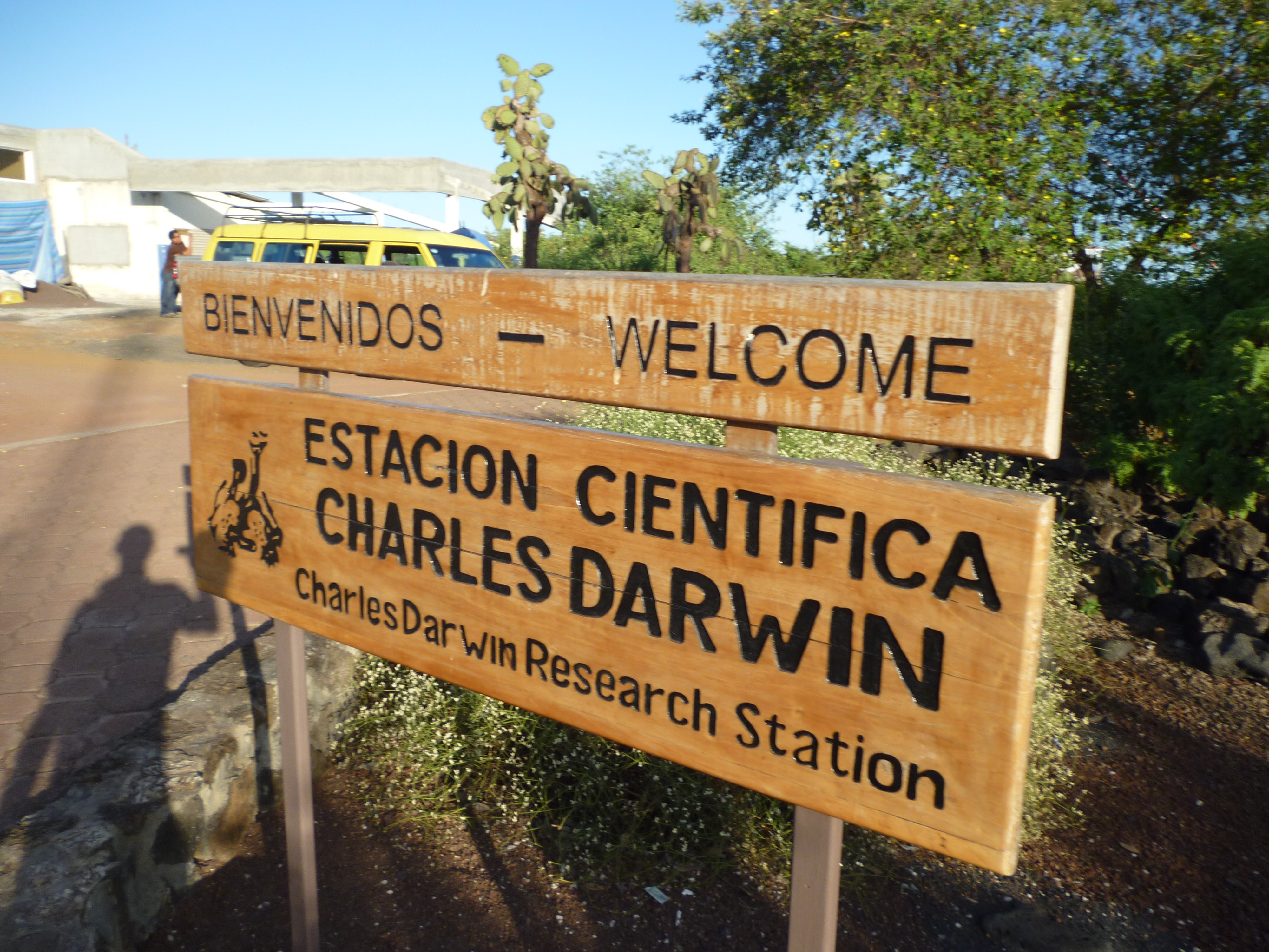 Foto de aviso informativo de Estación Científica Charles Darwin, en Galápagos, Ecuador. foto ref. David Adam Kess